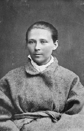 Praskov'ja Semenova Ivanovskaja (1853-1935)